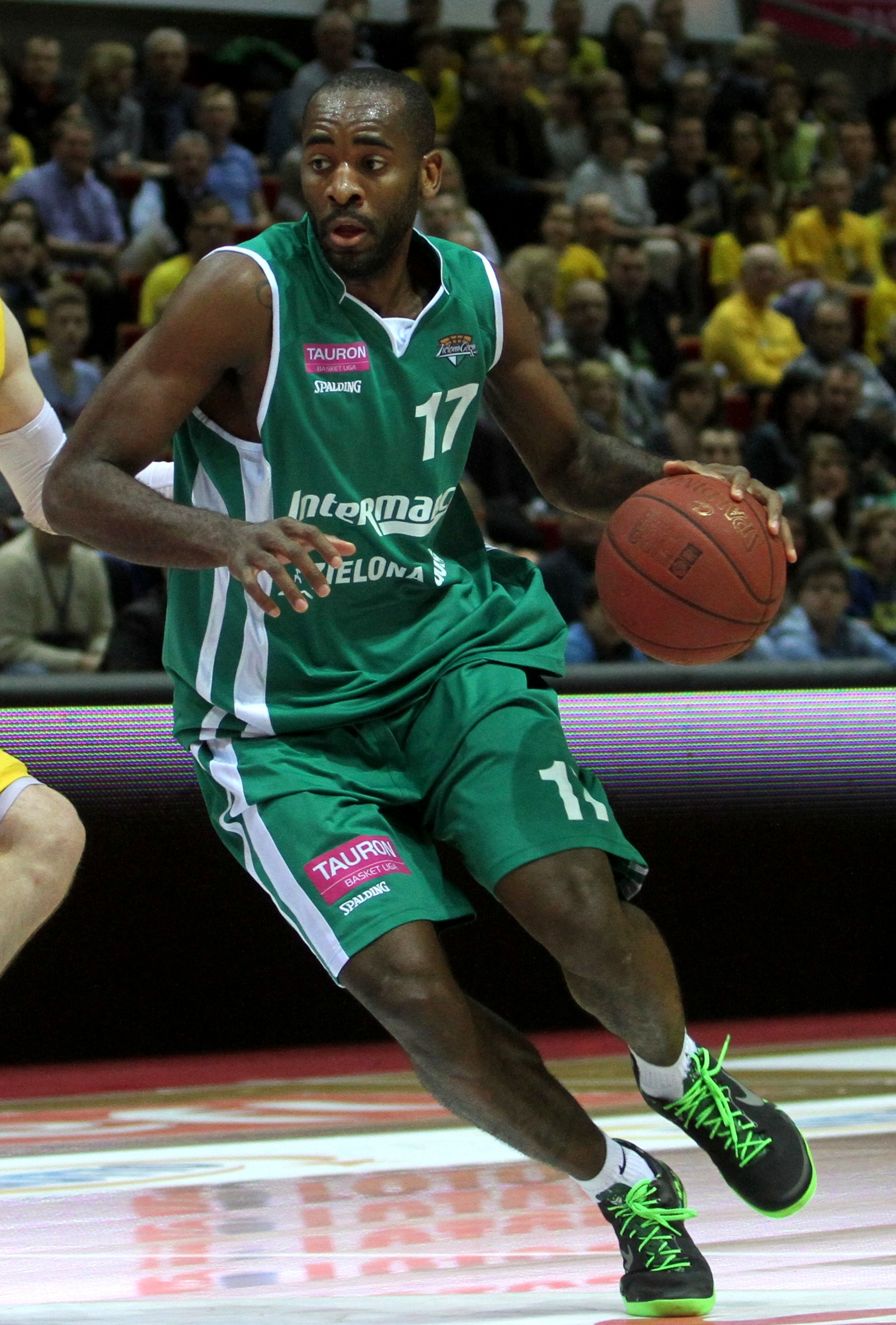 Adam Waczyński, Treﬂ Sopot, Christian Eyenga, Stelmet Zielona Góra